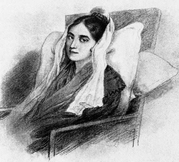 Александра Александровна Протасова, в замужестве Воейкова (1795-1829)- хозяйка литературного салона, адресат поэмы Жуковского "Светлана", супруга критика А.Ф. Воейкова